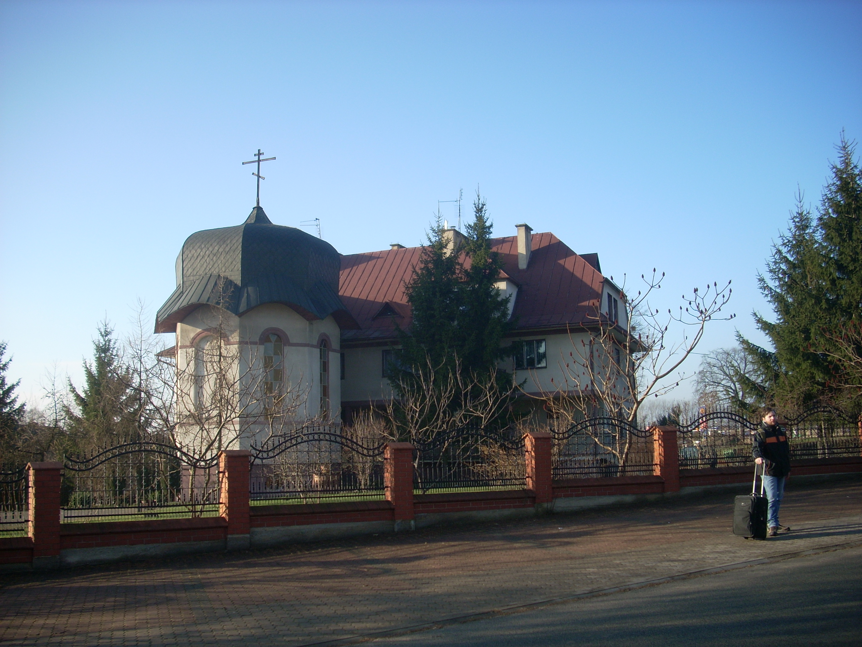 Plebania przy cerkwi św. św. Piotra i Pawła w Siemiatyczach z kaplicą św. Gabriela Zabłudowskiego